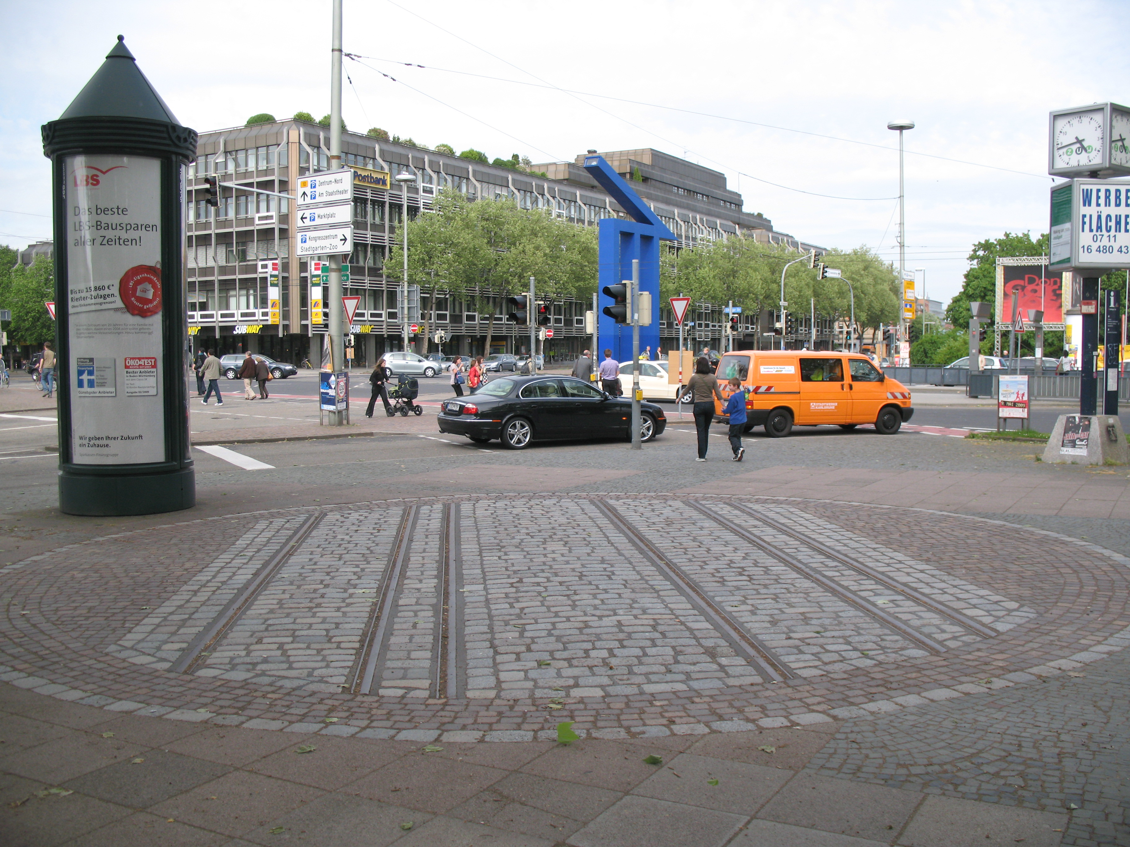 Denkmal in Form eines dreischienigen Gleisjochs am Ettlinger Tor, Kriegsstraße 15/ Ettlinger Str. in Blickrichtung Nordost, Teil der Karlsruher Lokalbahn (KLB), sogenanntes Lobberle, s. Stadtwiki Karlsruhe 2001 dort wiedererrichtet. 2011 im Rahmen der Bauarbeiten zur U-Strab abgebaut.